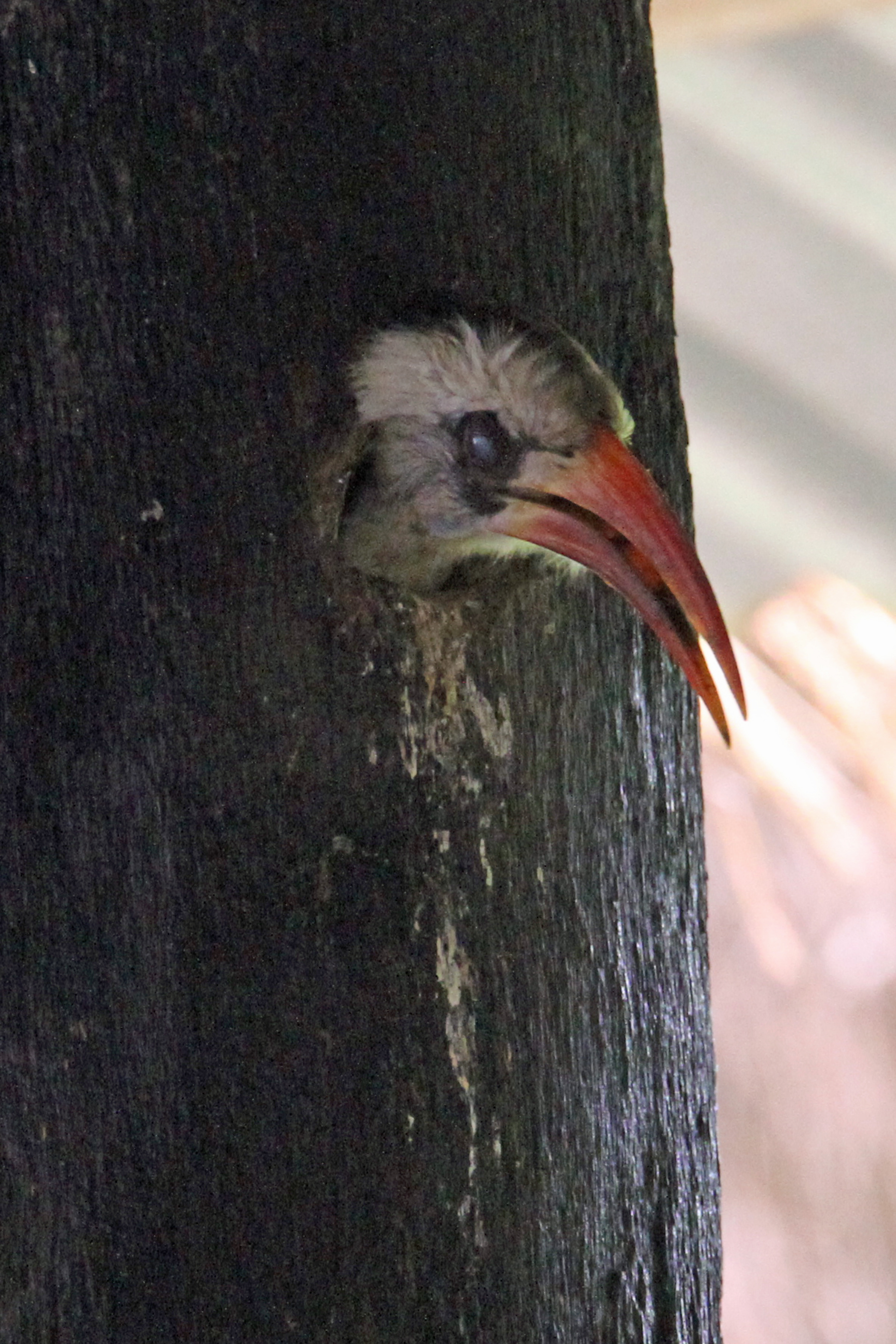 Red-billed Hornbill